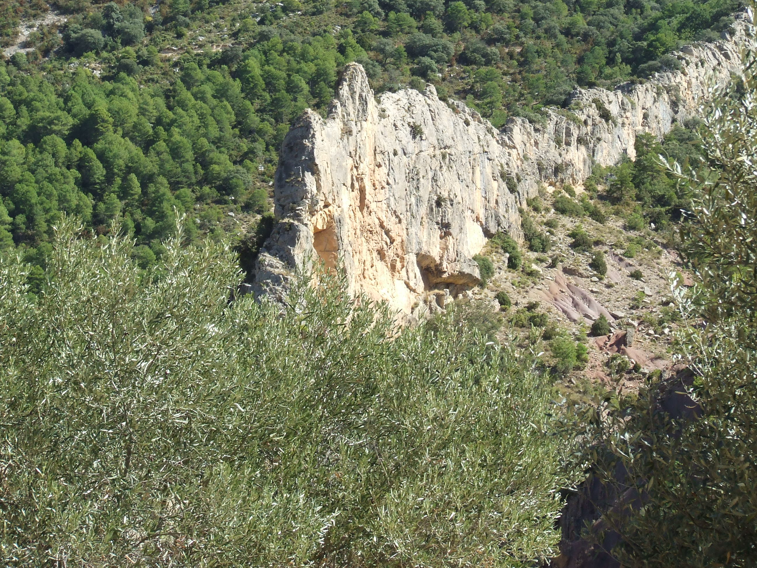 La Roca de Malimanya (Abella de la Conca, Pallars Jussà)